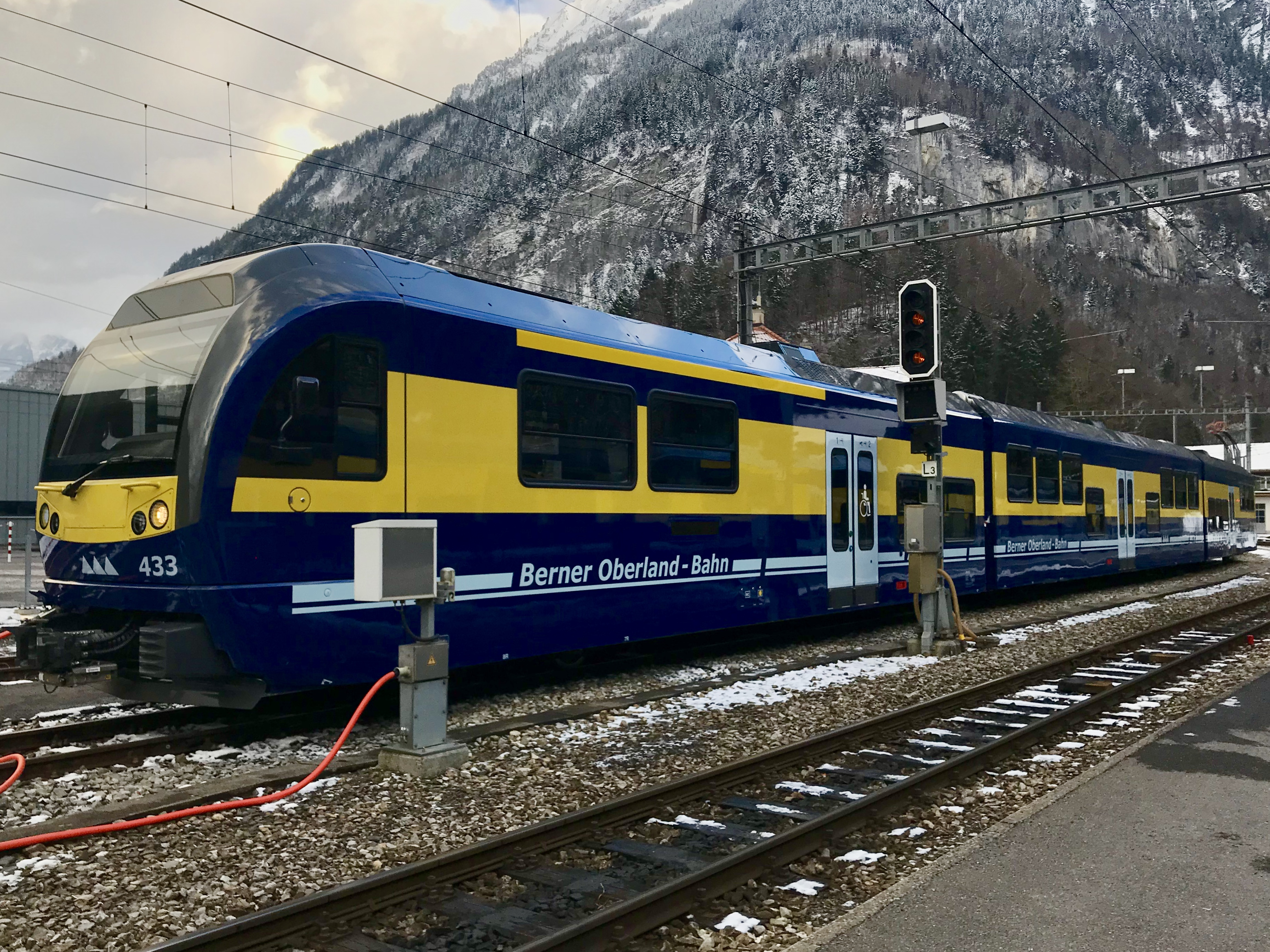 Der BOB Gelenksteuerwagen 2. Generation 433